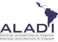 Bandera de la Asociación Latinoamericana de Integración - ALADI